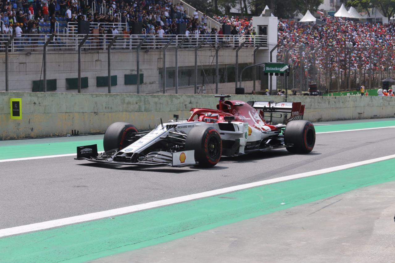 Governador do Estado de São Paulo, João Doria, durante Grande Prêmio do Brasil de F1 2019. Local: São Paulo/SP. Data: 17/11/2019